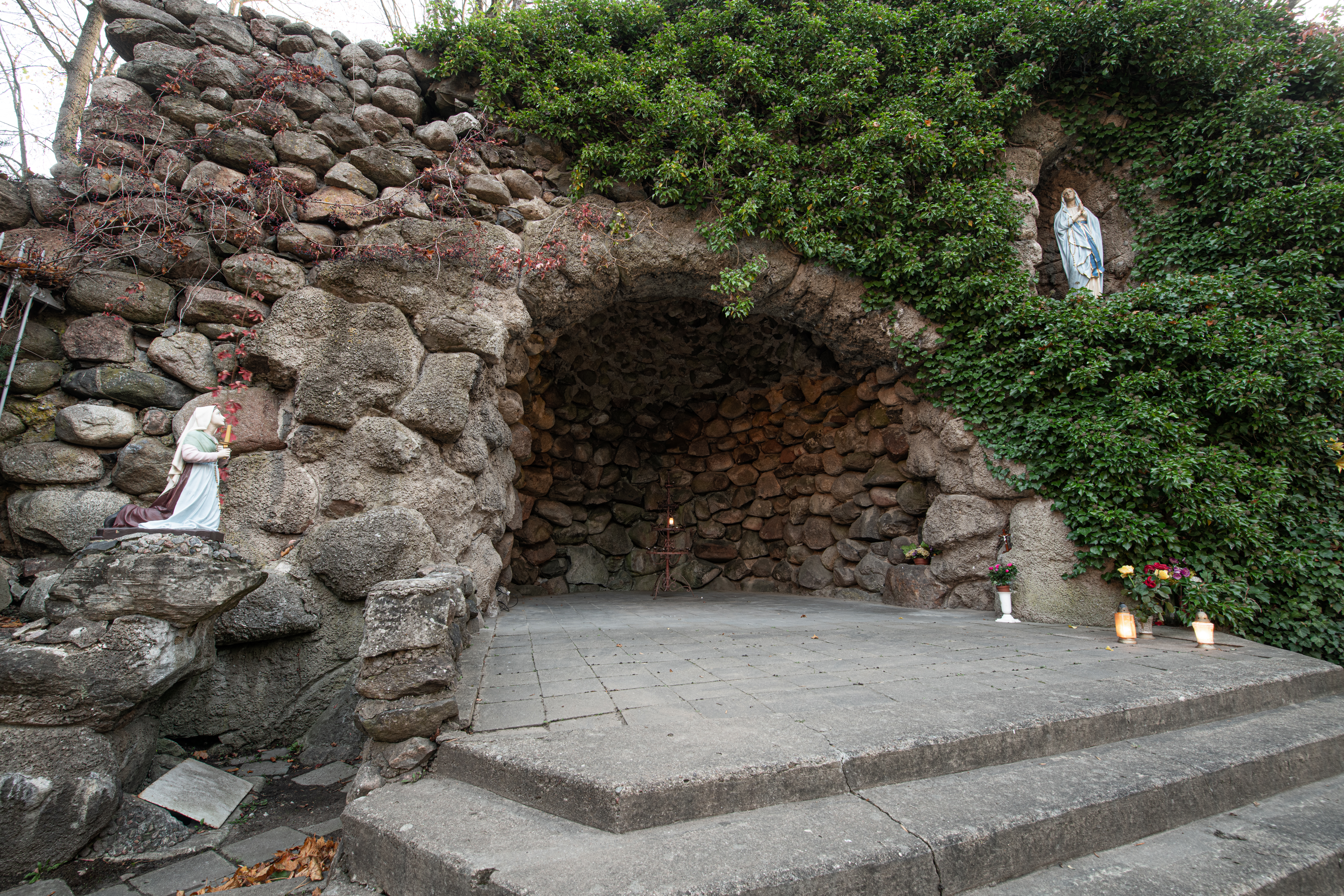 Kretingos Lurdas